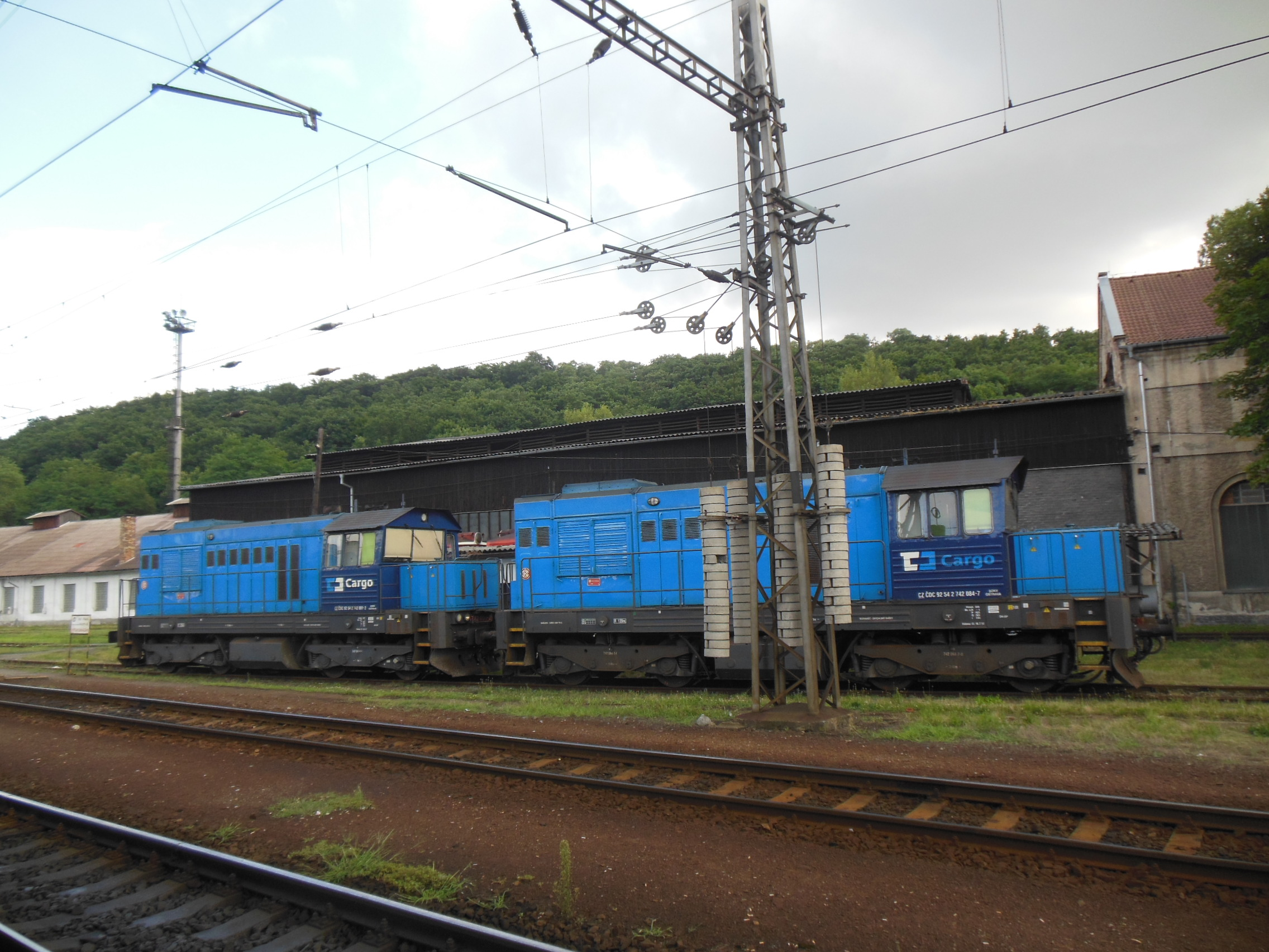 Kralupy nad Vltavou (okres Mělník). Železniční stanice, lokomotivy 742 spol. ČD Cargo.